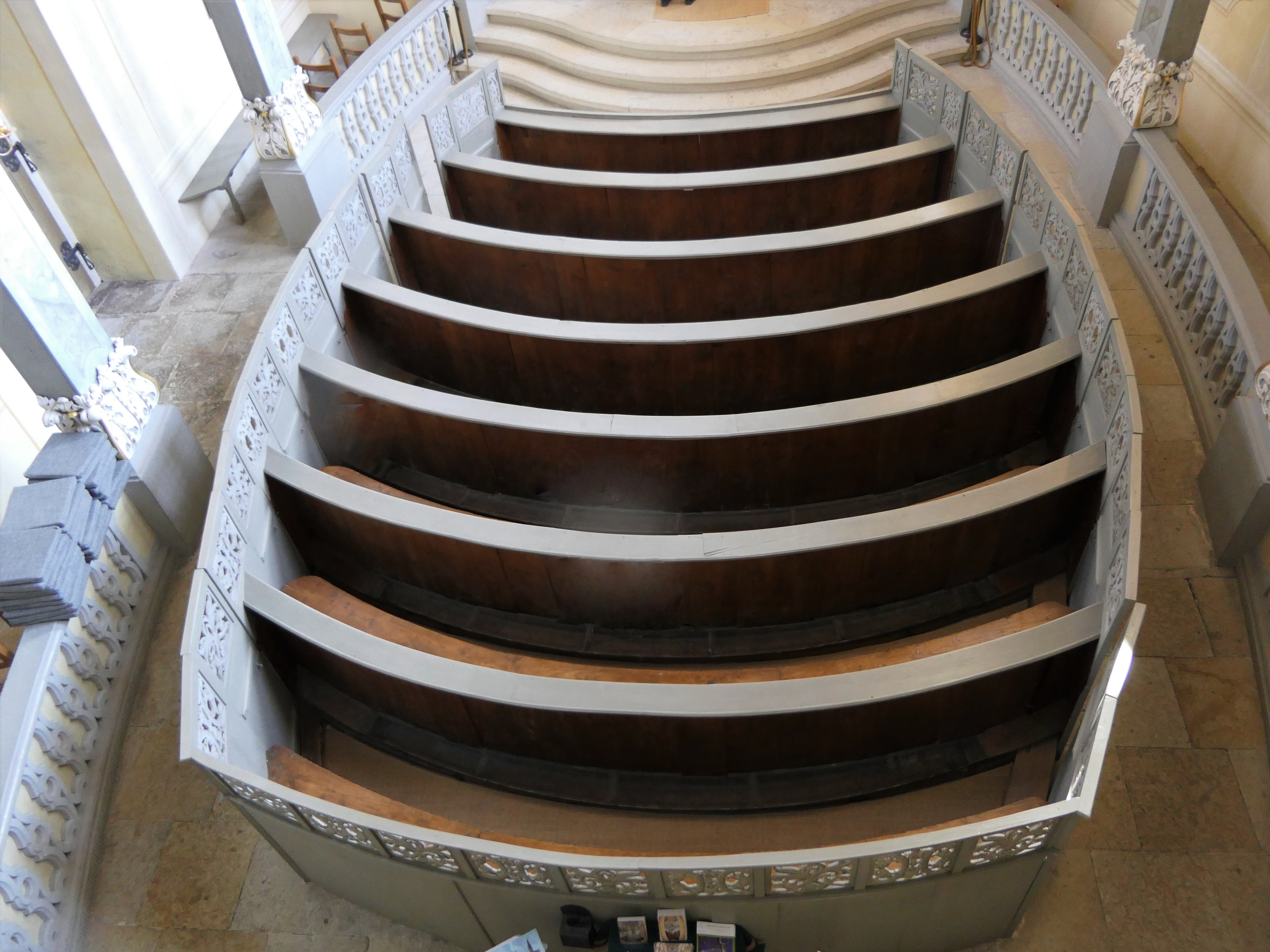 Bestuhlung in der Schloßkapelle Weesenstein